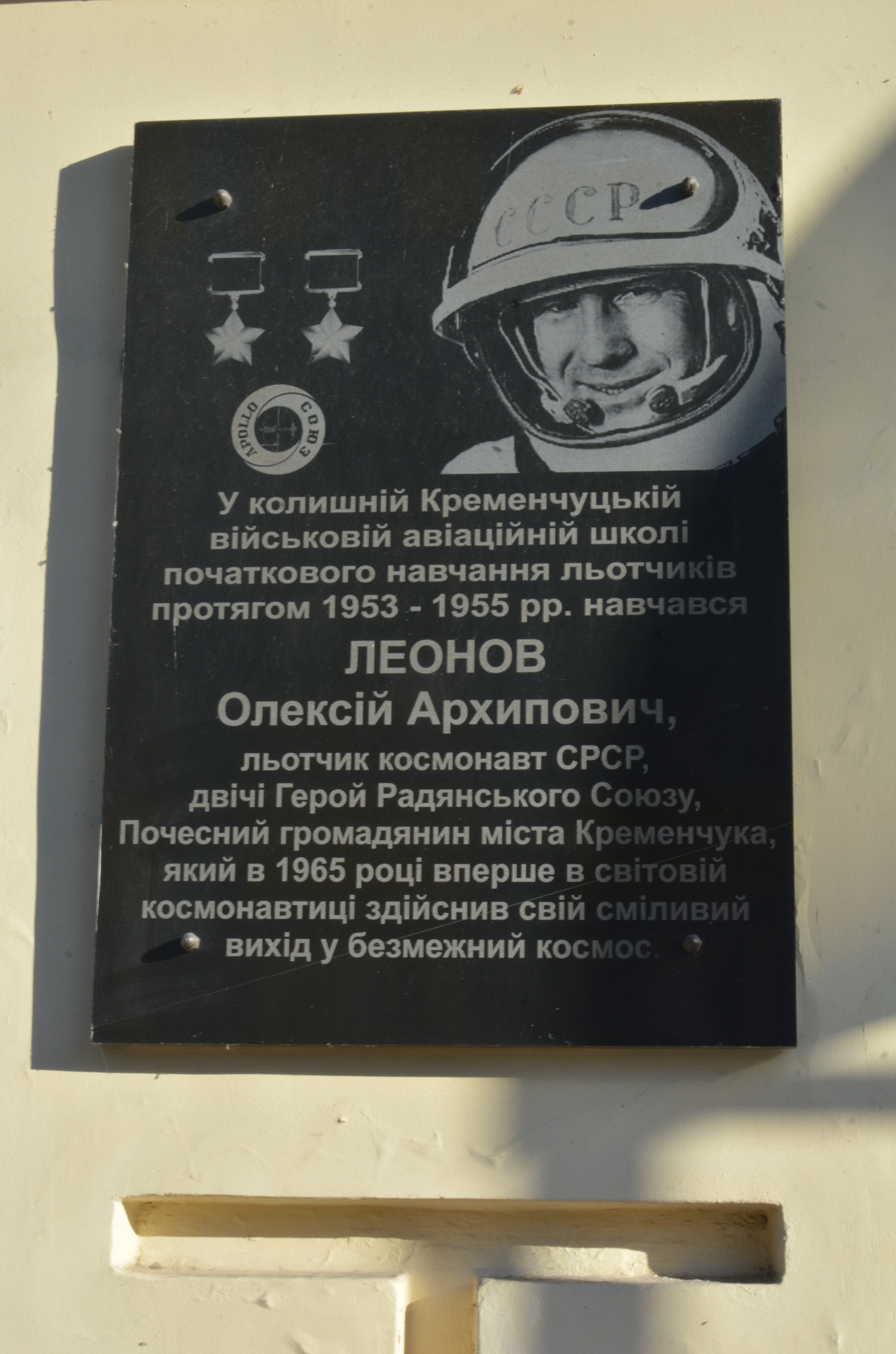 Жіноча гімназія (нині 2 корпус Кременчуцького училища цивільної авіації), Кременчук, Вул. Гоголя 6/17